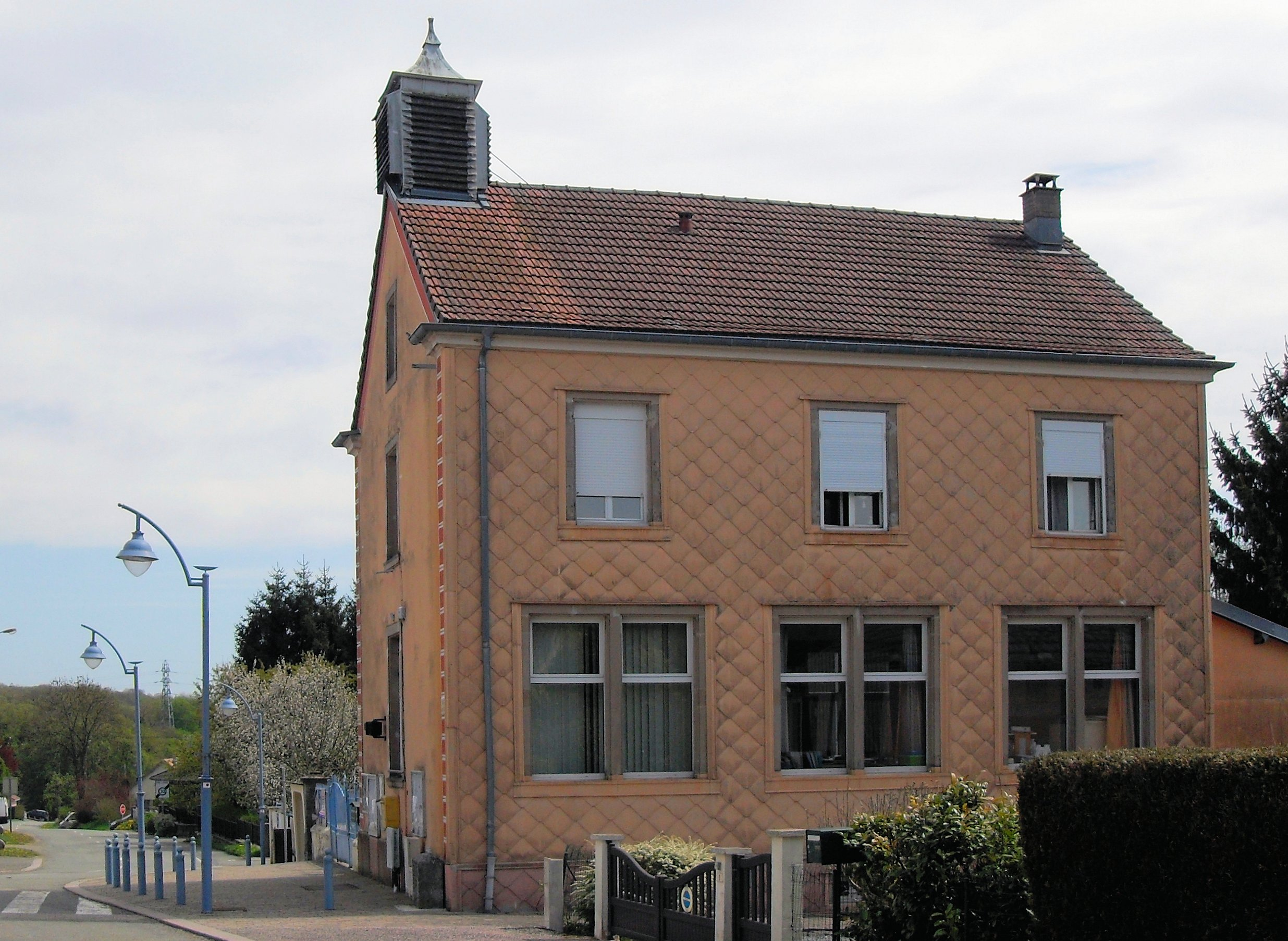 La mairie d'Urcerey